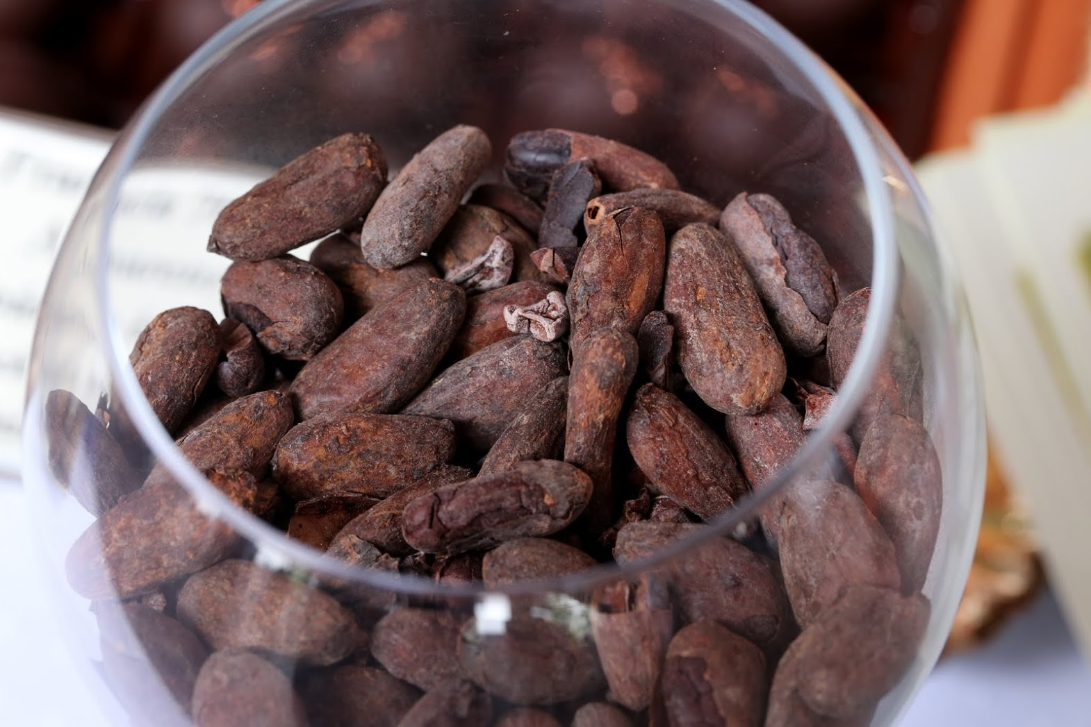 Kakaóbab